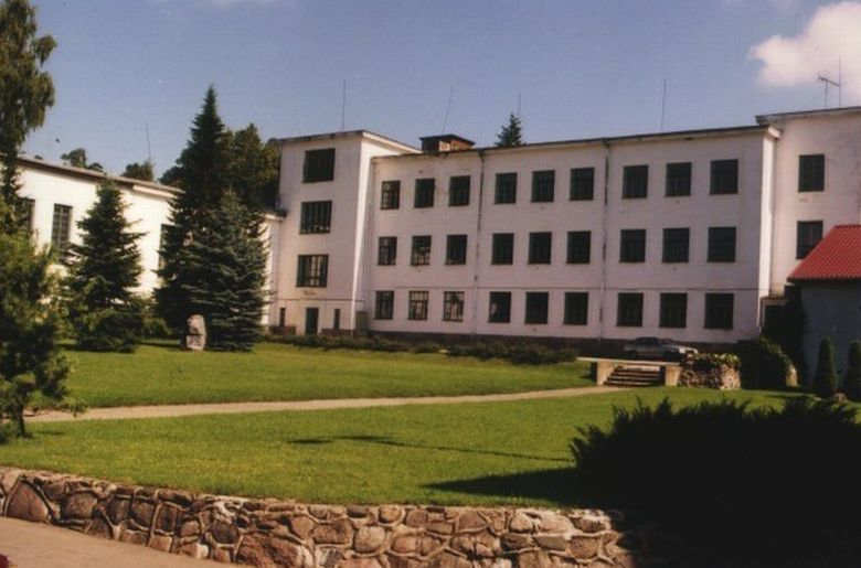 Tõrva Gümnaasiumi tagaõu